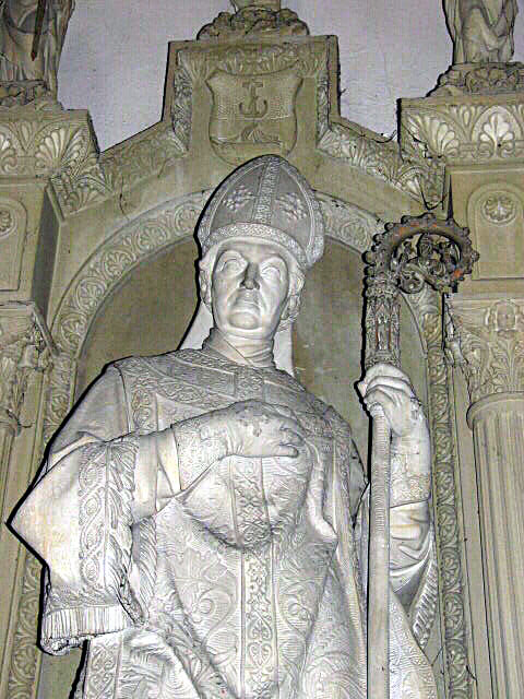 Darstellung des Bischofs Georg Anton von Stahl auf seinem Epitaph im Würzburger Dom